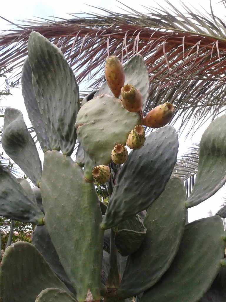 كاكتوس تنگ طه